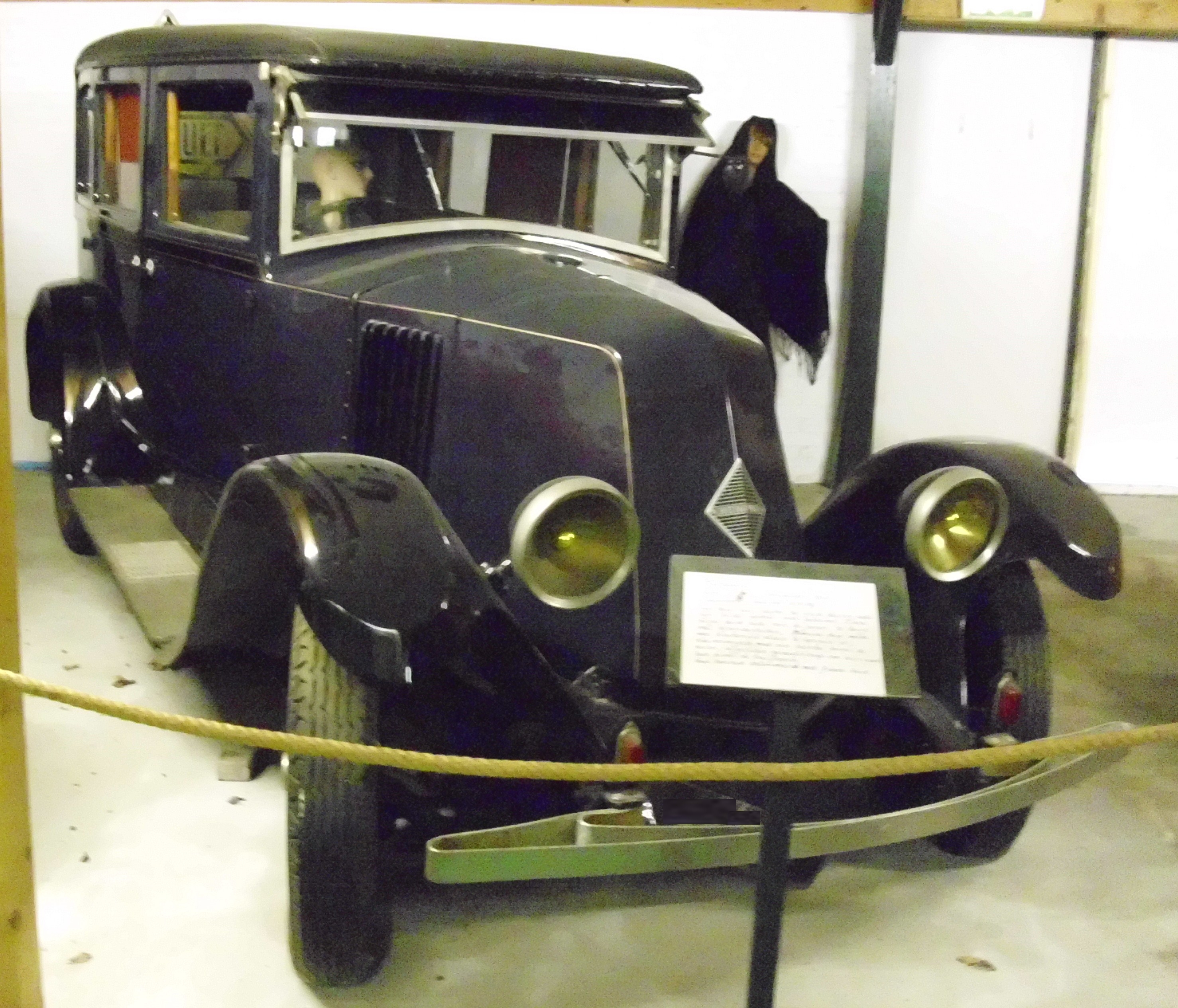 Renault Type KZ 2 Limousine 1927-1928